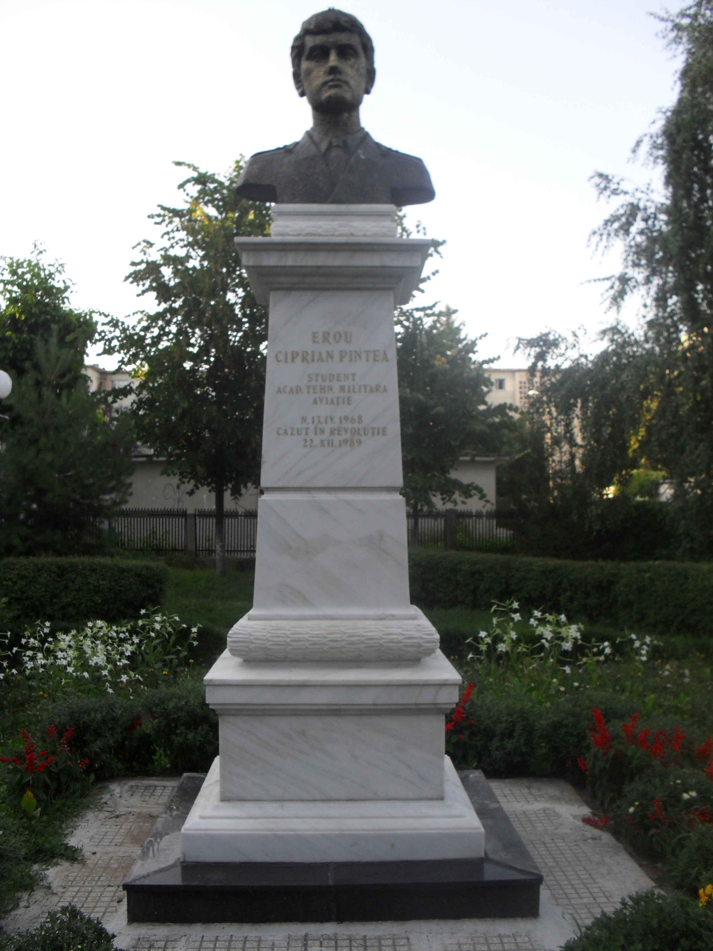 Statuia lui Ciprian Pintea din orasul Bacau, Romania